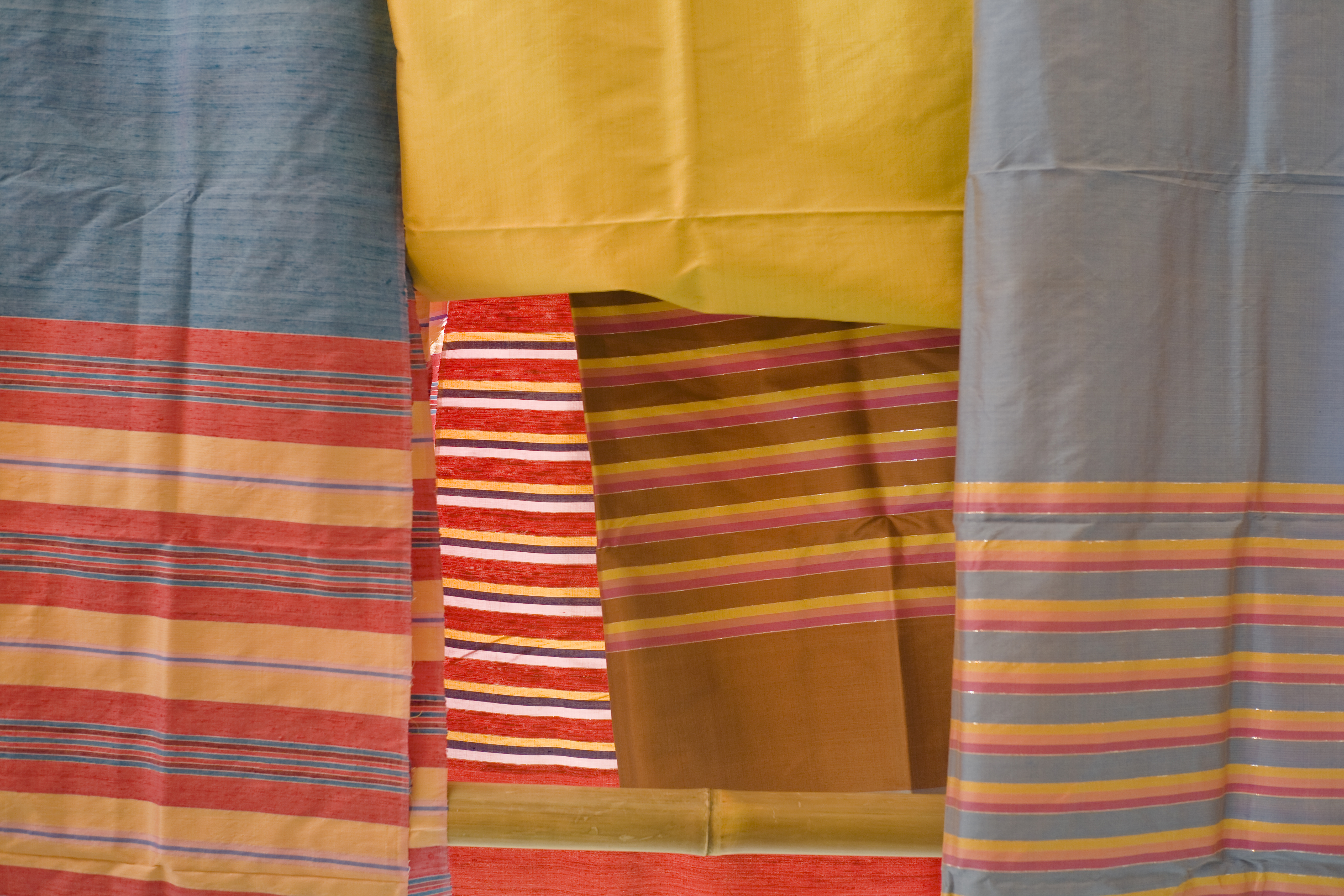 กลุ่มผ้าหลากสี นายกรัฐมนตรีหลังจากพิธีมอบเกียรติบัตร Thailand's Best Friends ประจำปี 2553 ณ ตึกสันติไมตรี ทำเนียบรัฐบาล วันพุธ ที่ 30 มิถุนายน พ.ศ 2553 (The Official Site of The Prime Minister of Thailand Photo by พีรพัฒน์ วิมลรังครัตน์)